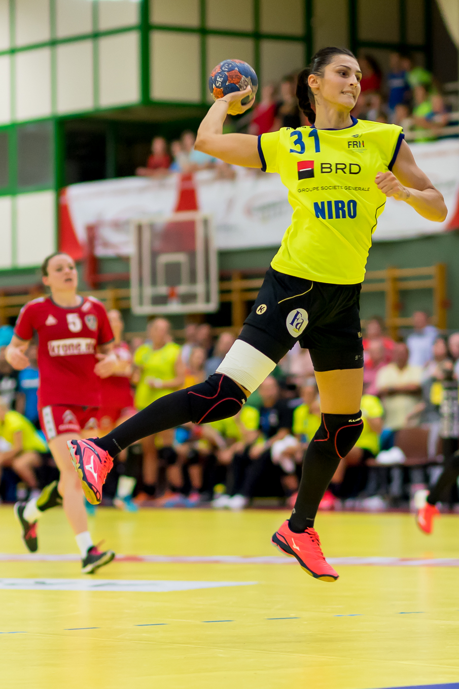 Damenhandball WM-Qualifikation Playoff Österreich vs Rumänien am 13. Juni 2017 in Stockerau. Bild zeigt Madalina Maria Zamfirescu (ROU).